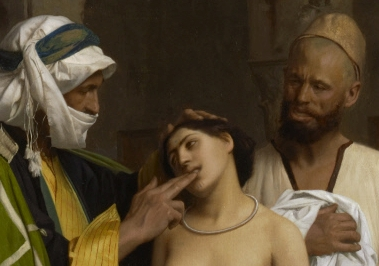 Detail Central Figures